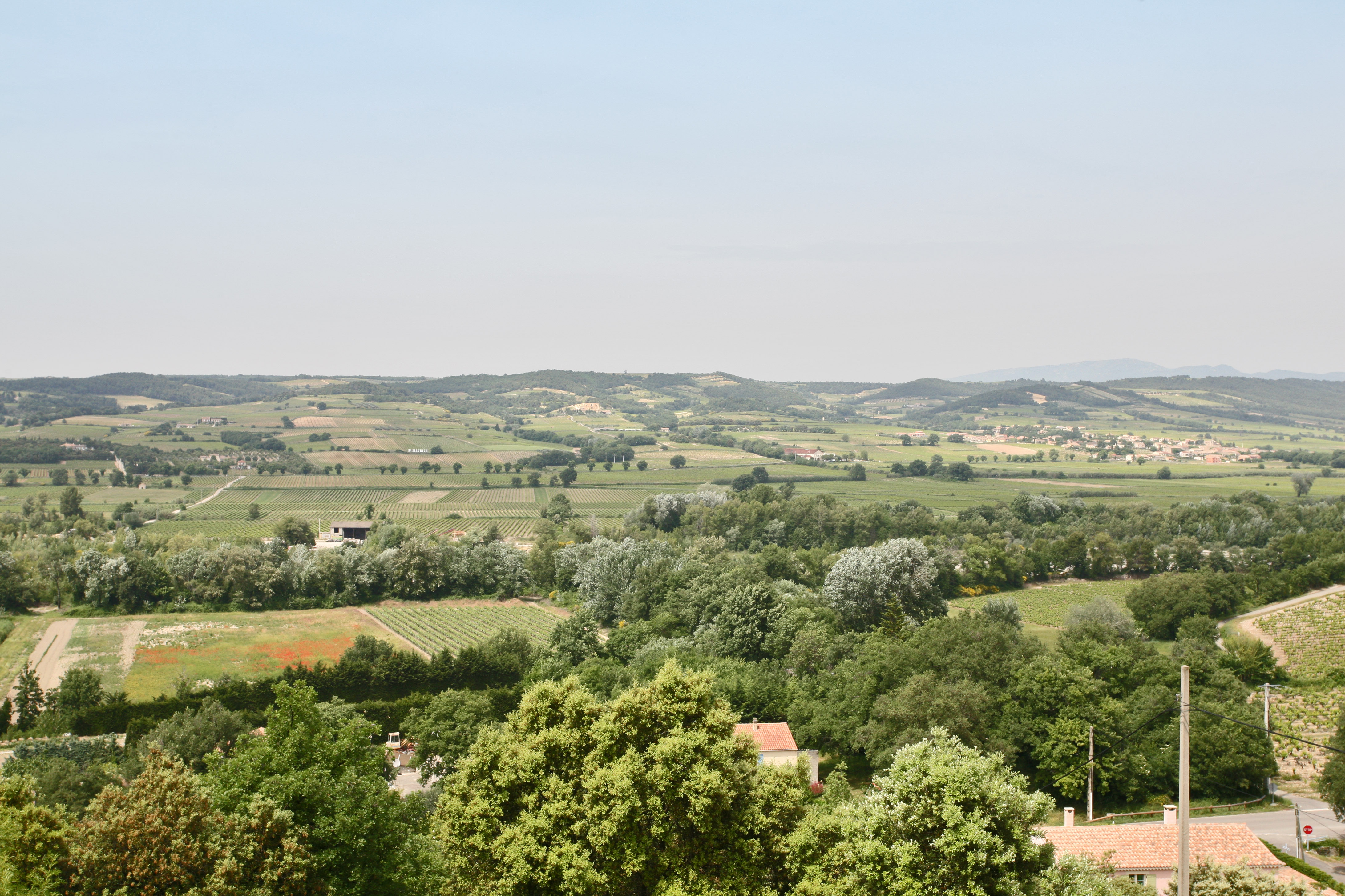 Vue depuis Buisson (Vaucluse) vers la plaine et la commune voisine de Saint Maurice-sur-Eygues (Drome)